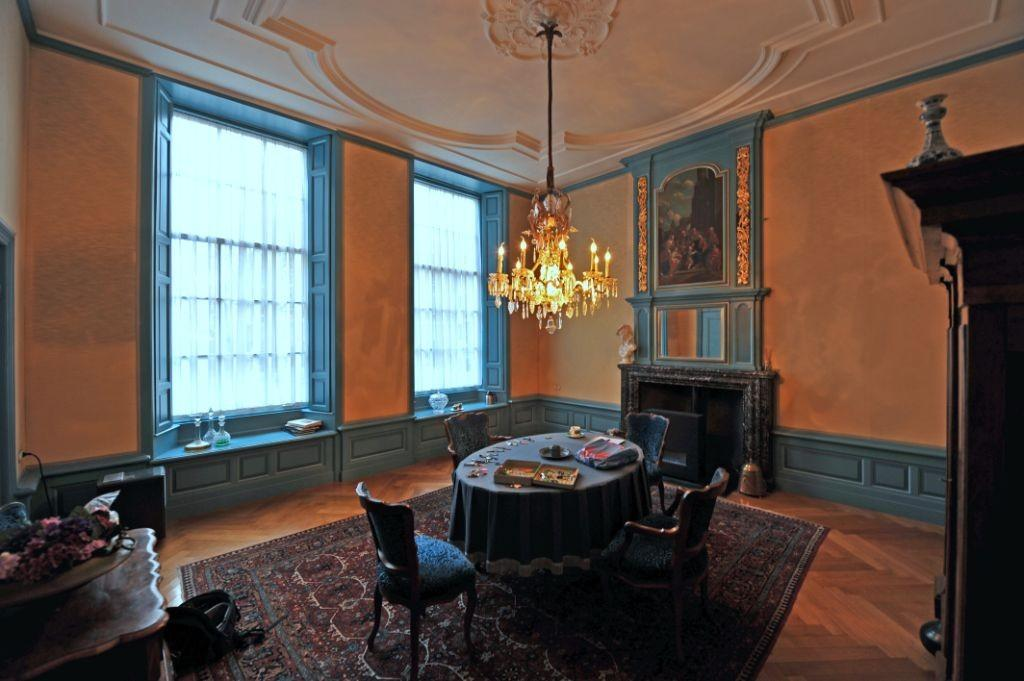 Regentenkamer van het Hooftshofje in Den Haag